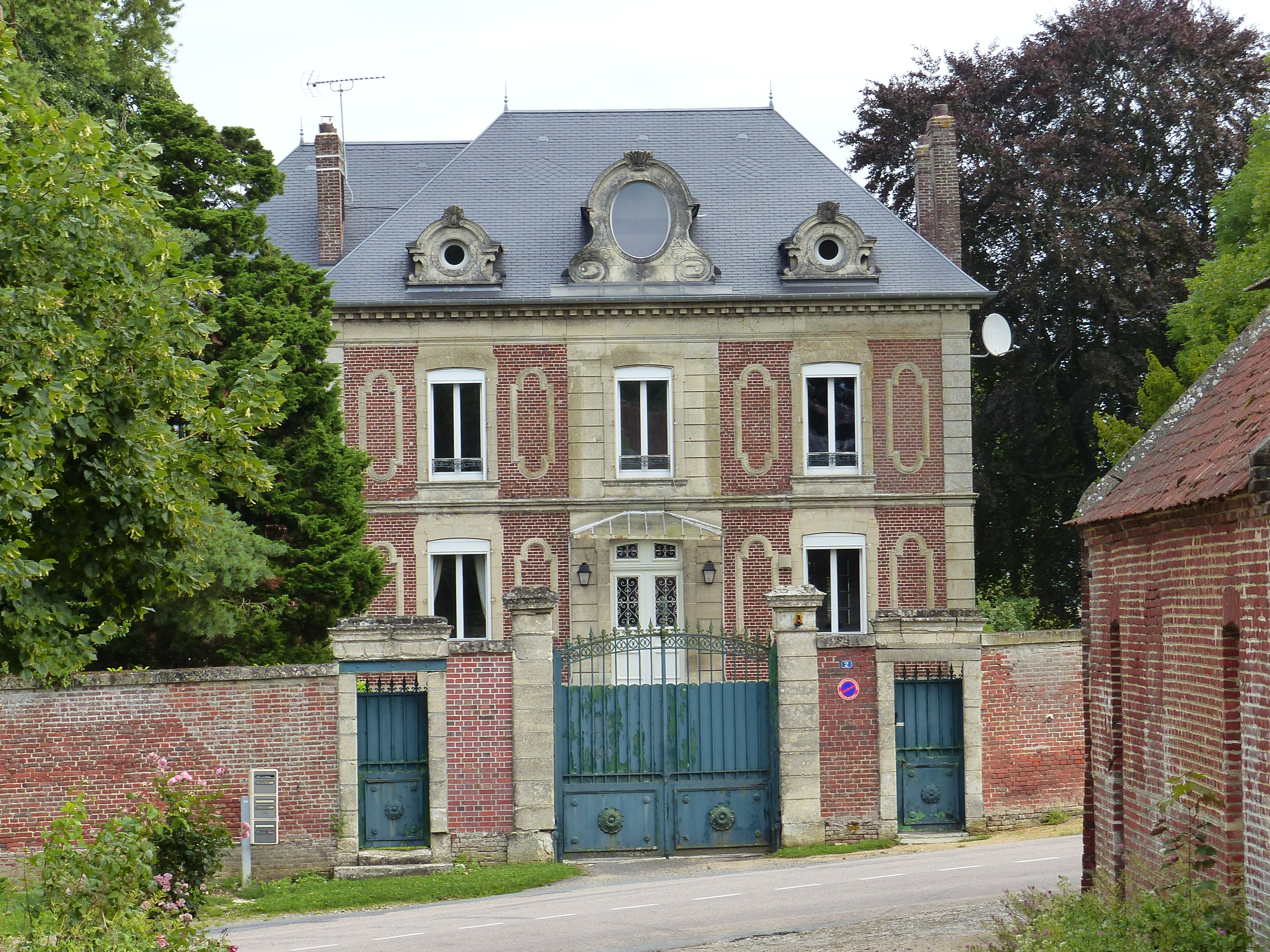 Maison de maître à Thieux